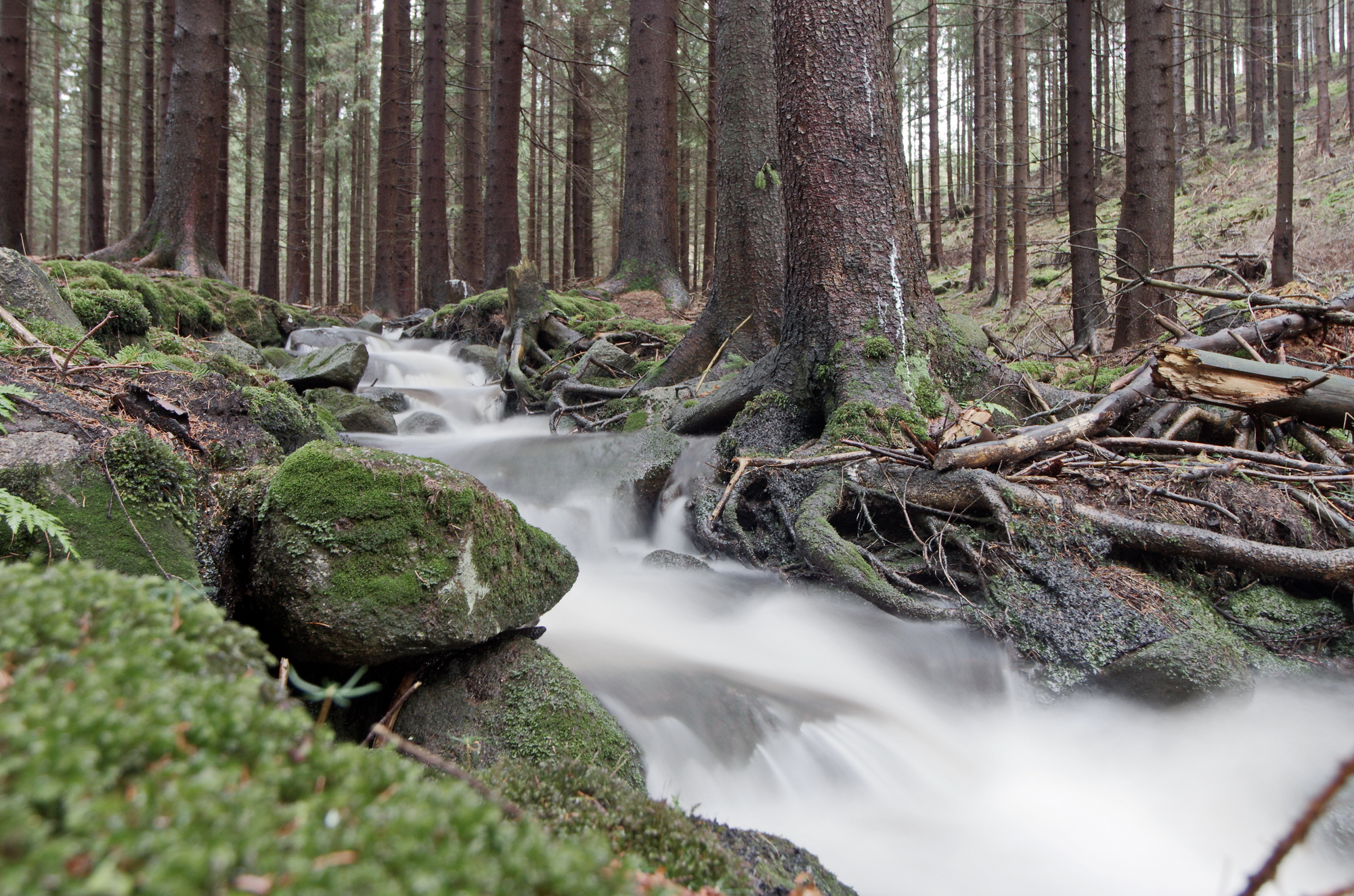 Milířský potok, přítok Lobezského potoka, Slavkovský les, okres Sokolov